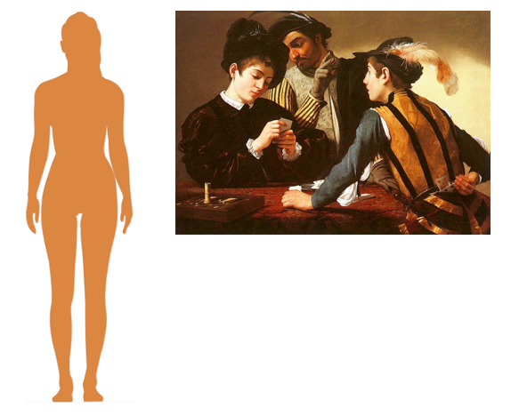 Silhouette d'une femme se tenant à côté du tableau afin d'en visualiser la taille